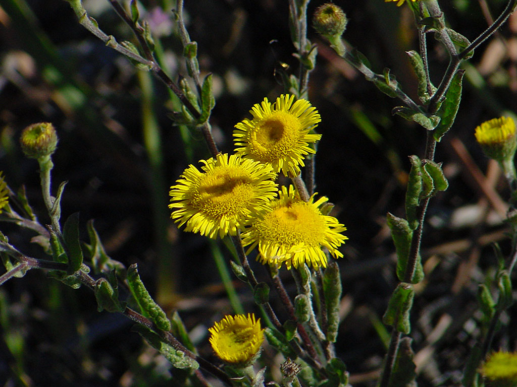 Pulicaire odorante (Pulicaria odora)